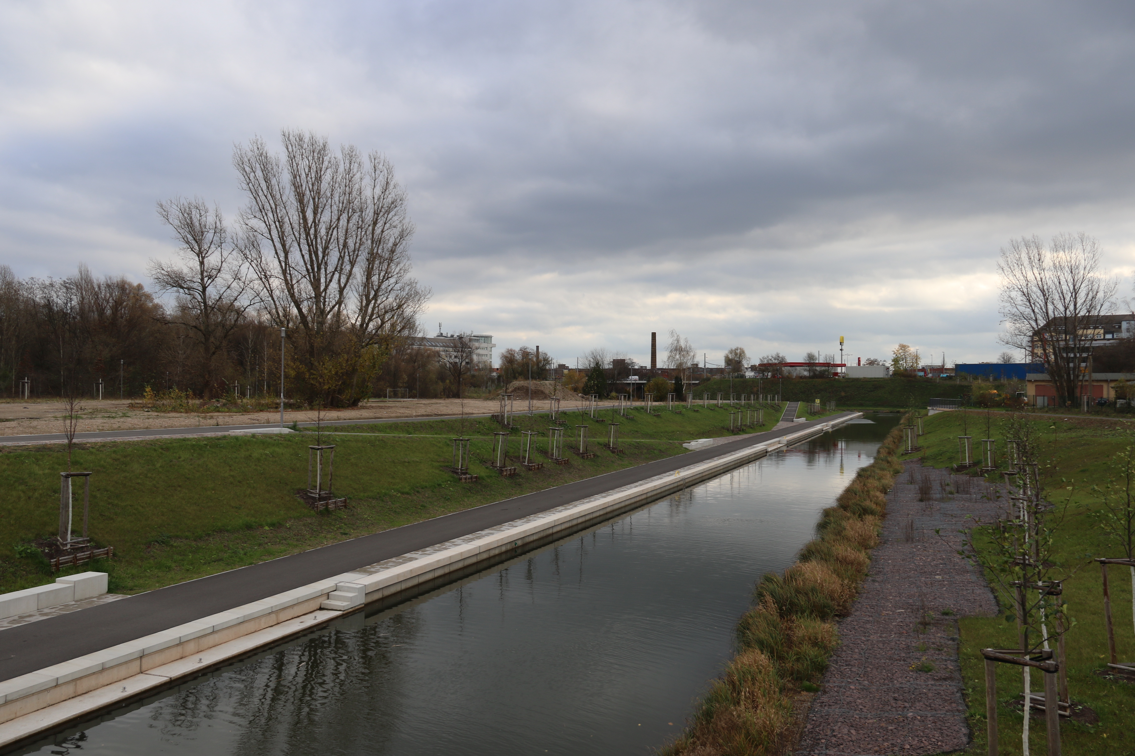 Blick in den Verbindungskanal Hafenbecken zum Karl-Heine-Kanal